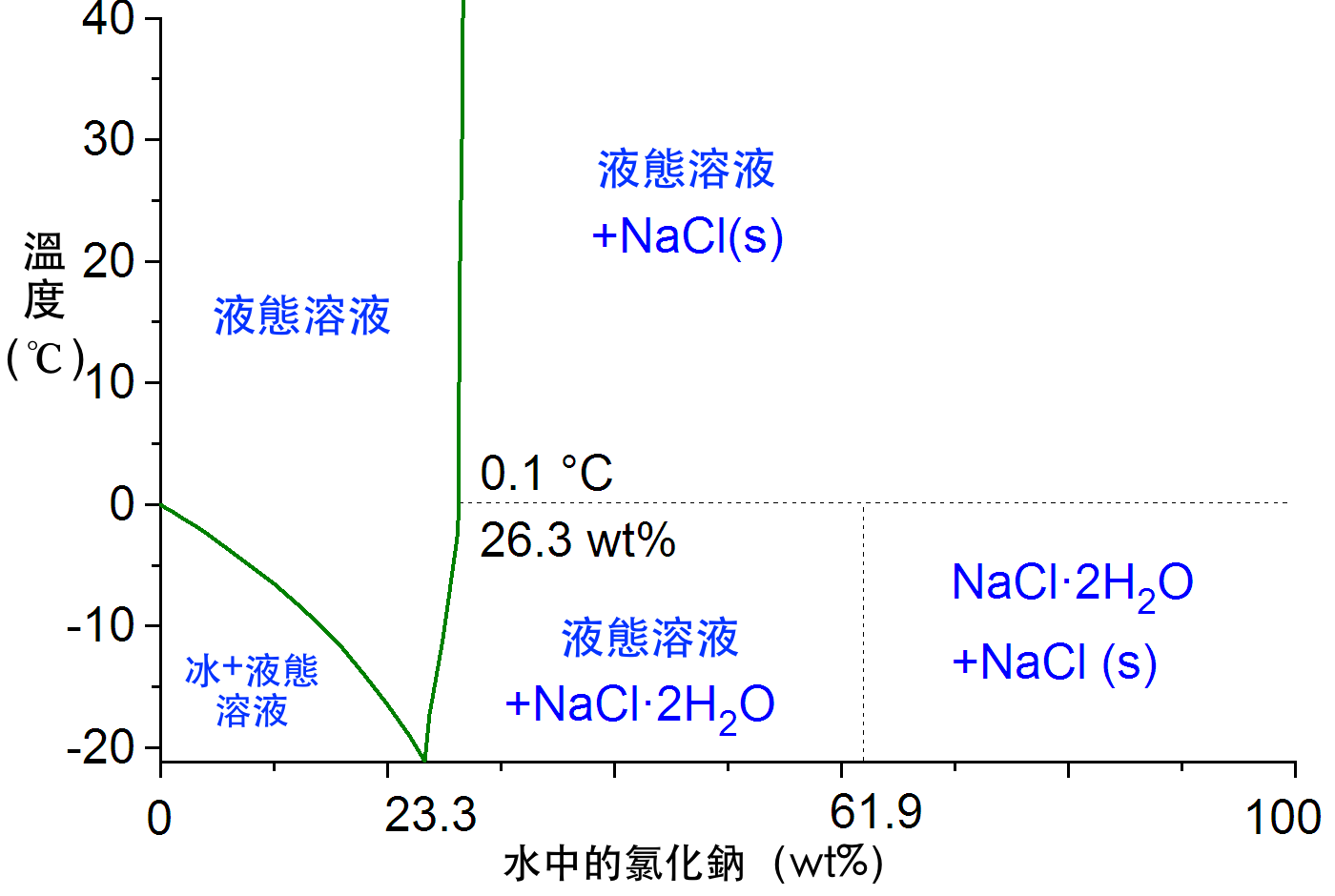 常壓下水鹽體系的相圖